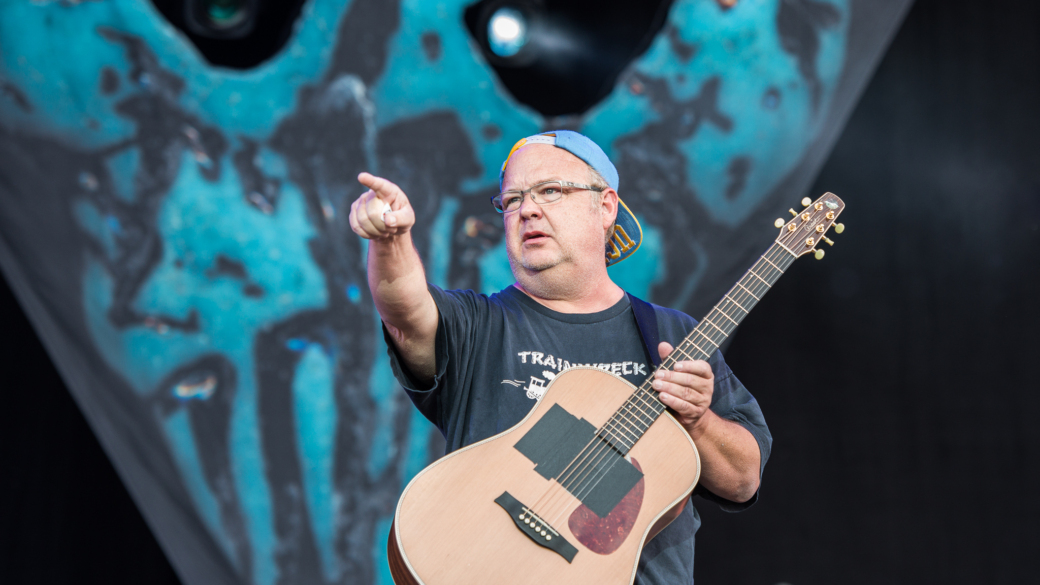 ARGO-Konzerte,Festival,Konzert,Kyle Gass,Livekonzert,Livemusik,Musik,RiP,Rock im Park 2016,Seat Zeppelin Stage,Tenacious D